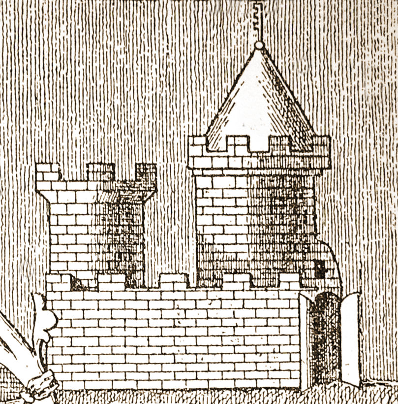 Burg Wiedelah 1363; stilisierte Darstellung auf der Grabplatte des Hildesheimer Bischofs Heinrich III.